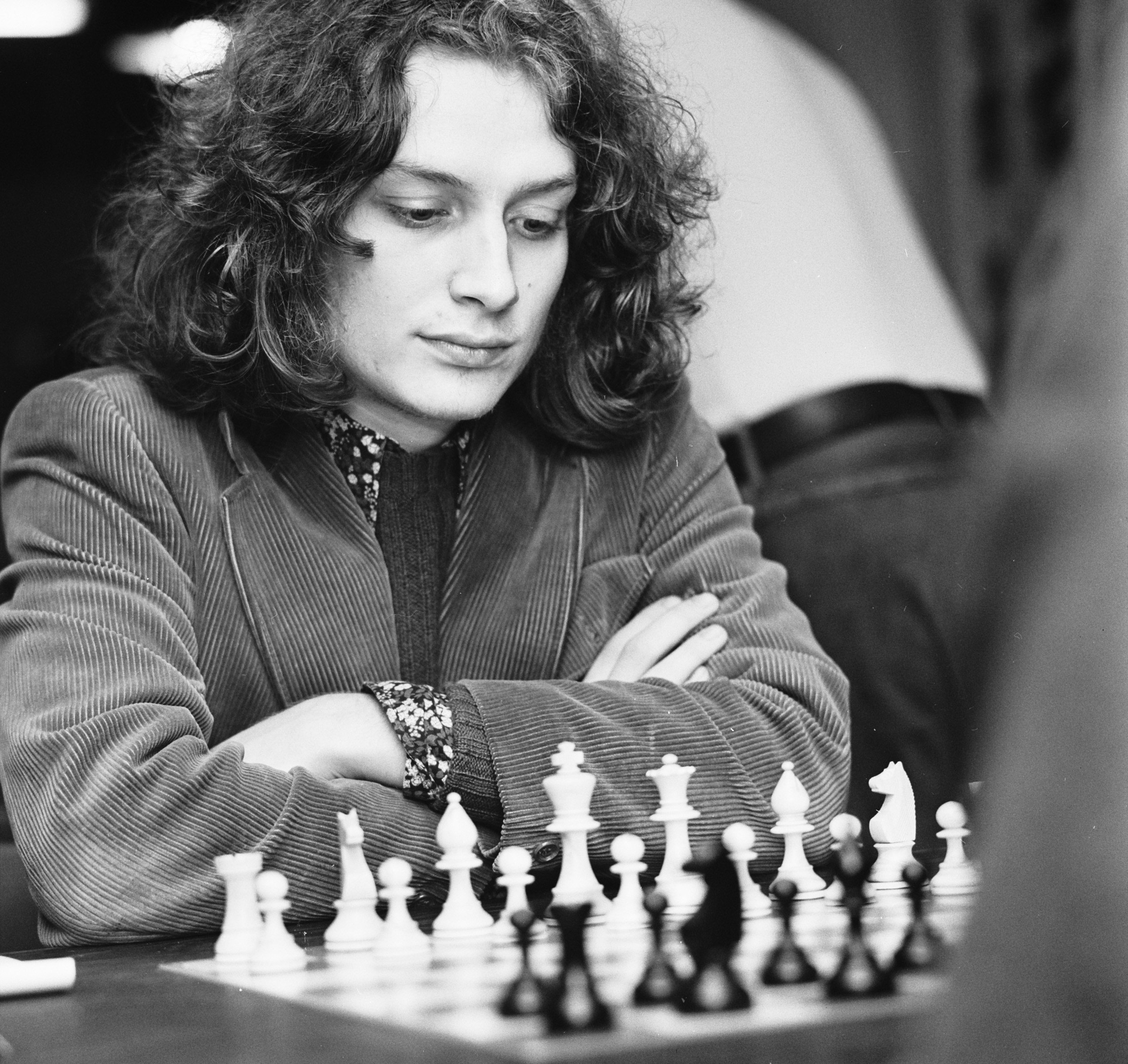 Collectie / Archief : Fotocollectie Anefo Reportage / Serie : Hoogovenschaaktoernooi te Wijk aan Zee Beschrijving : Timman tijdens een partij Datum : 15 januari 1974 Locatie : Noord-Holland, Wijk aan Zee Trefwoorden : portretten, schaken, schakers Persoonsnaam : Timman, Jan Instellingsnaam : Hoogovenschaaktournooi Fotograaf : Mieremet, Rob / Anefo Auteursrechthebbende : Nationaal Archief Materiaalsoort : Negatief (zwart/wit) Nummer archiefinventaris : bekijk toegang 2.24.01.03 Bestanddeelnummer : 926-9434